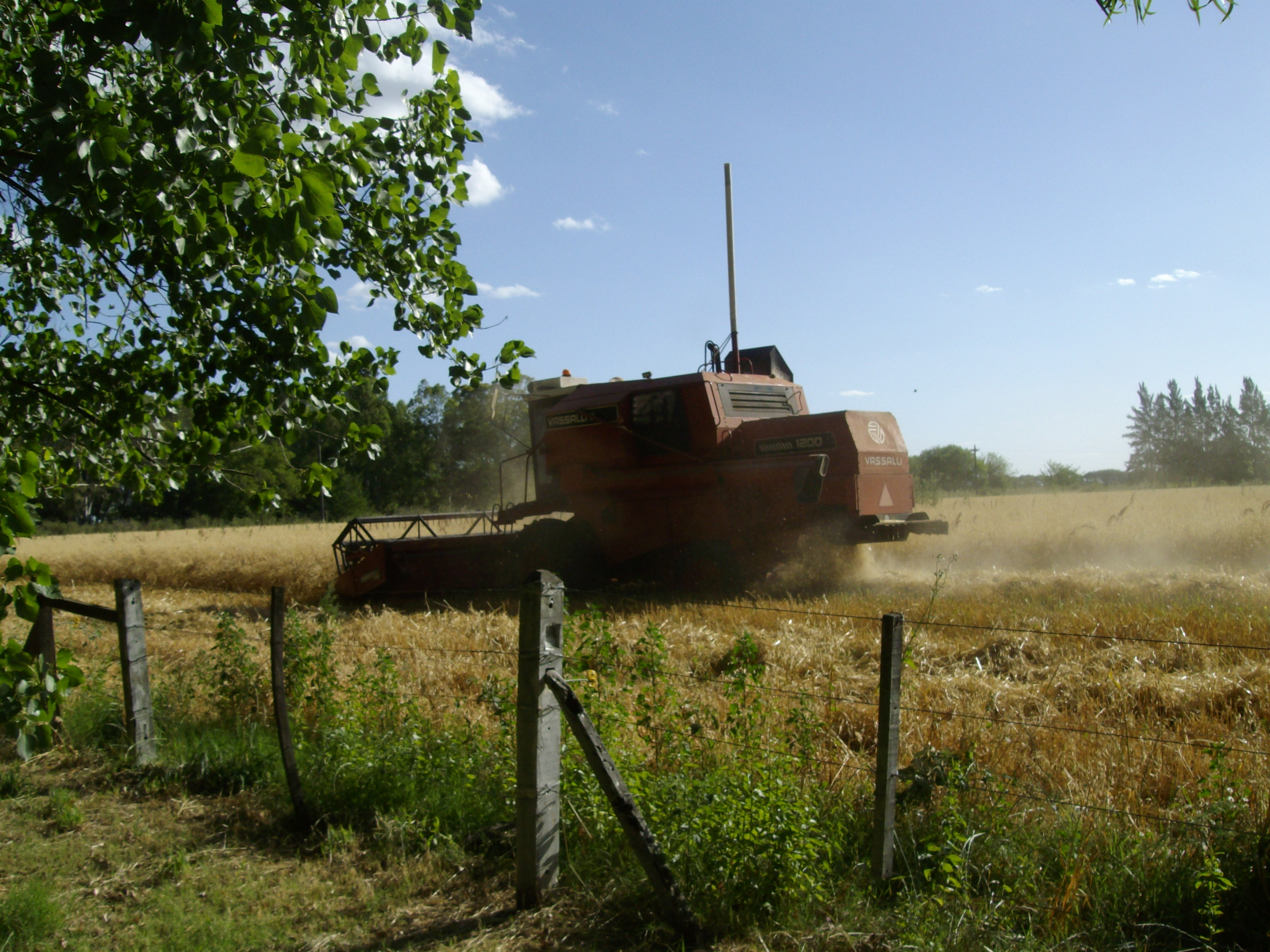 Colheitadeira em uma fazenda em Luján, Argentina. Vassalli 1200.